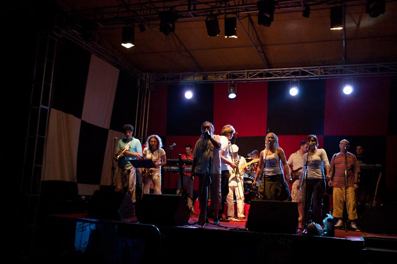 DAB-KST-2009-12.jpg